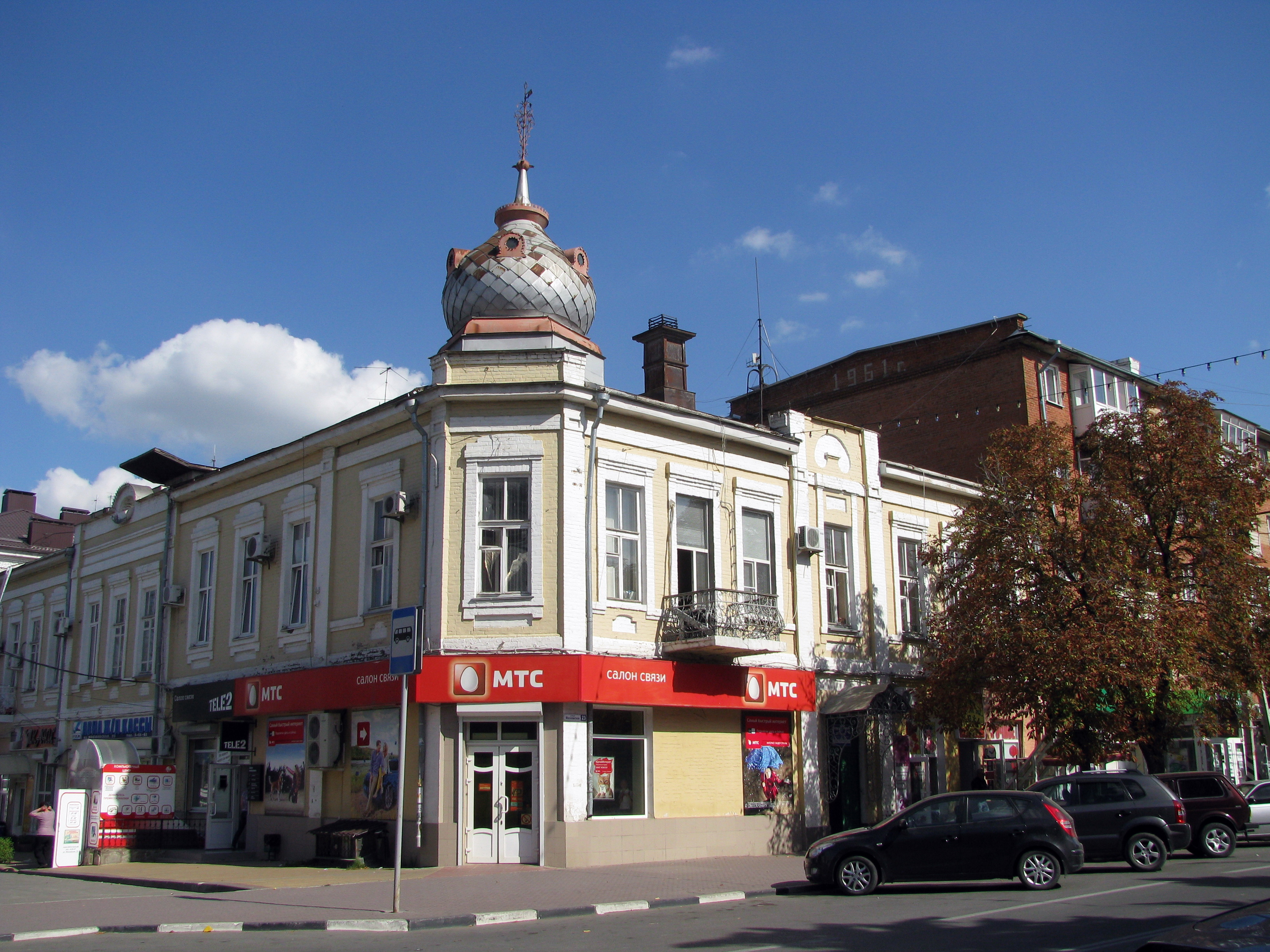 Доходный дом Е.К.Ковалева: улица Московская, 23, Азов, Ростовская область